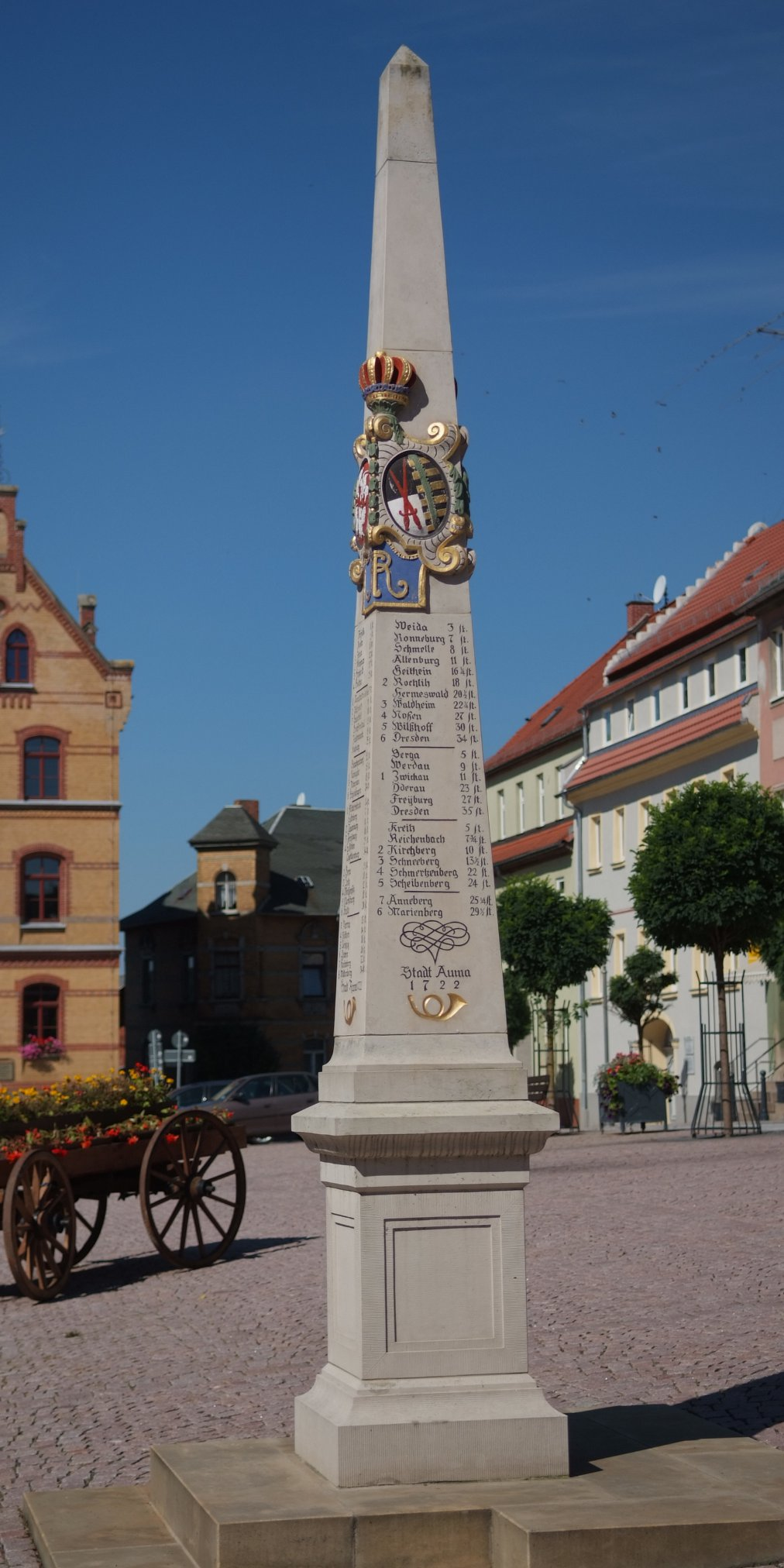 Kursächsische Distanzsäule in Auma von 1722